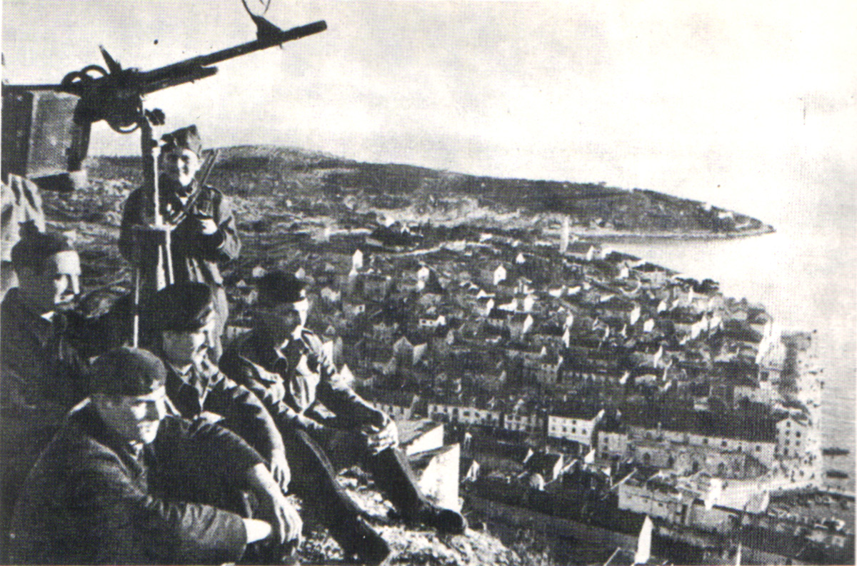 Srpskohrvatski / српскохрватски: Partizansko protivavionsko mitraljesko gnezdo iznad Hvara